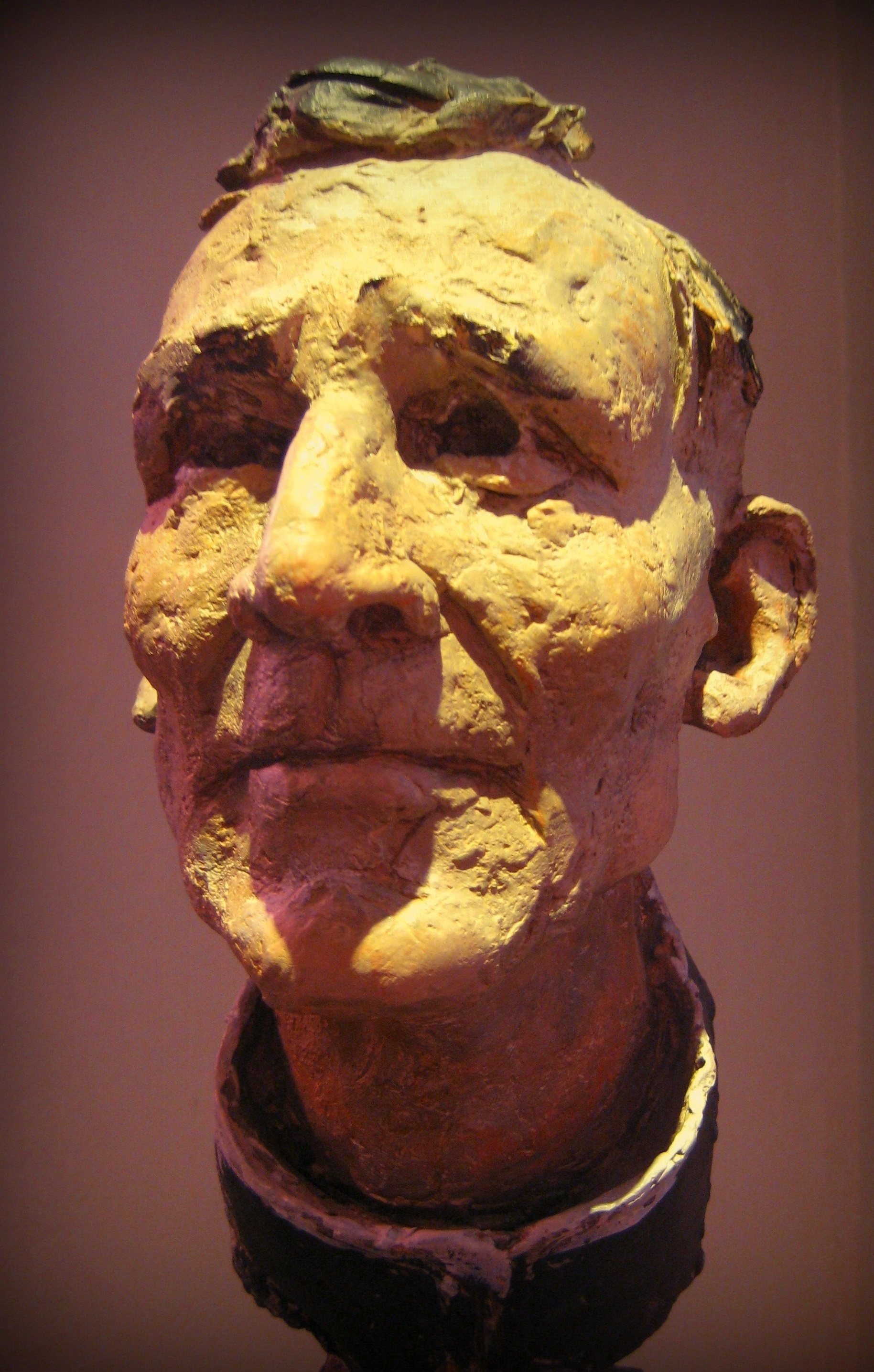 Karlheinz Oswald: Porträtskulptur des Mainzer Pfarrers Franz Adam Landvogt